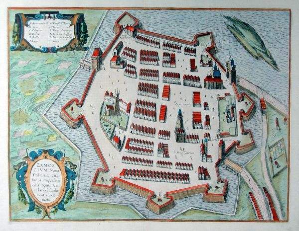 Zamość in XVII century, ZAMOSCIUM, Nova Poloniae civitas